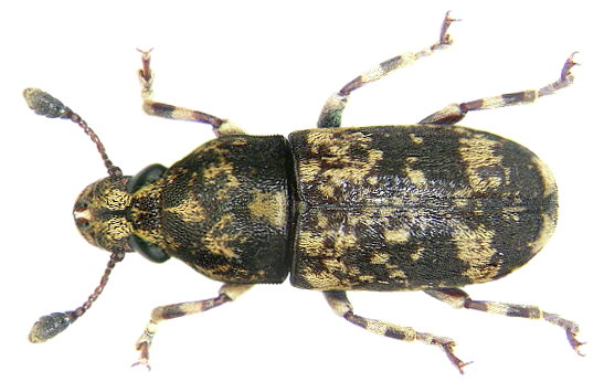 Familie: Anthribidae Groesse: 8 mm Fundort: Indonesien, Halmahera, Dolik leg. A.Skale, 2006; det. Frieser, 2006 Photo: U.Schmidt, 2006